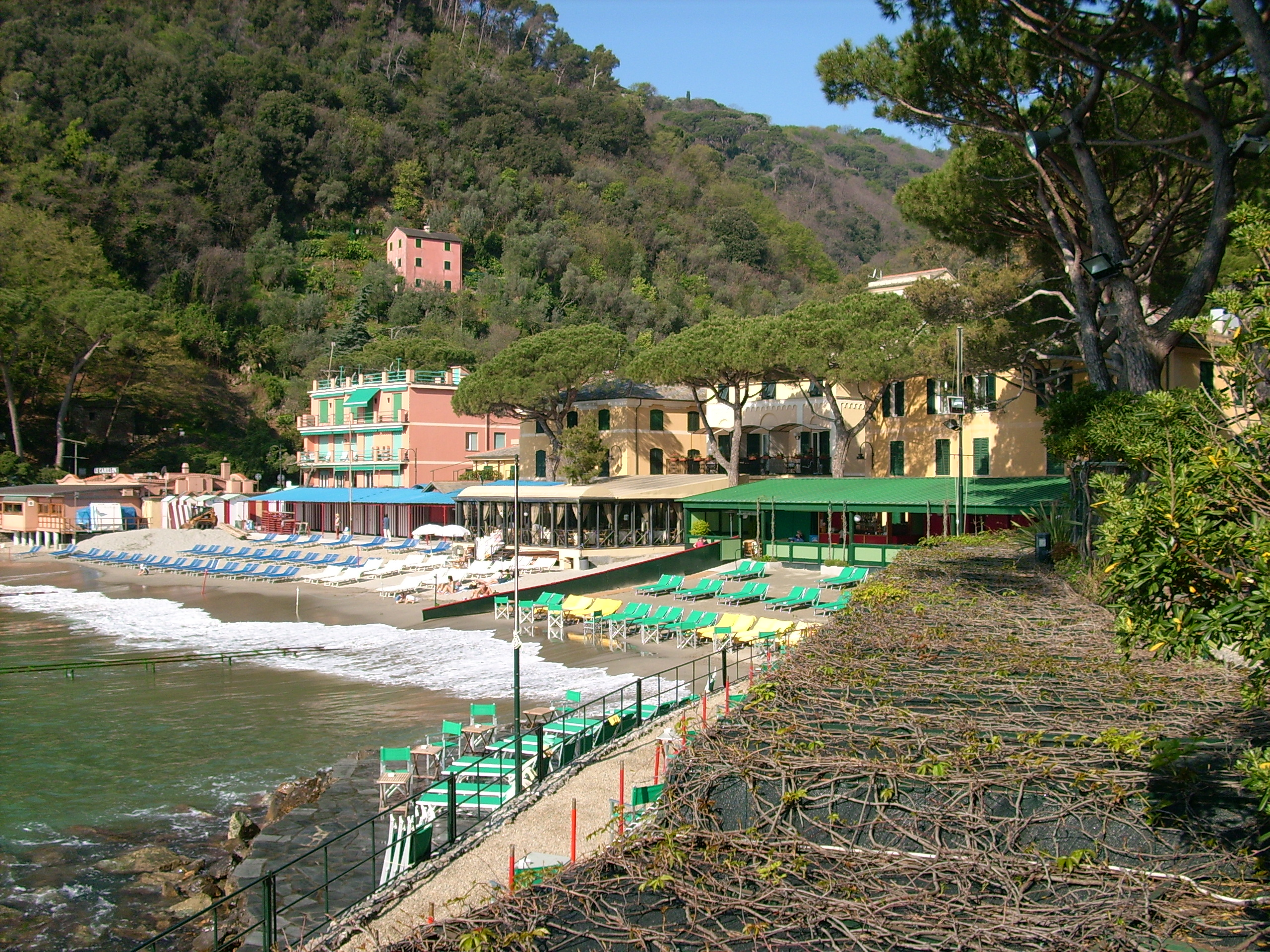 Baia di Paraggi (Santa Margherita Ligure), Liguria, Italia